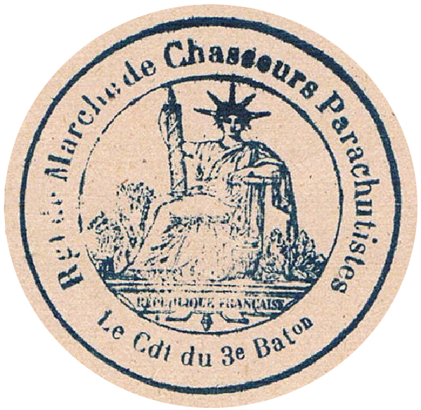 Tampon encreur officiel du 3e bataillon du 5e régiment de chasseurs parachutistes prélevé sur un courrier officiel daté du 6 avril 1945